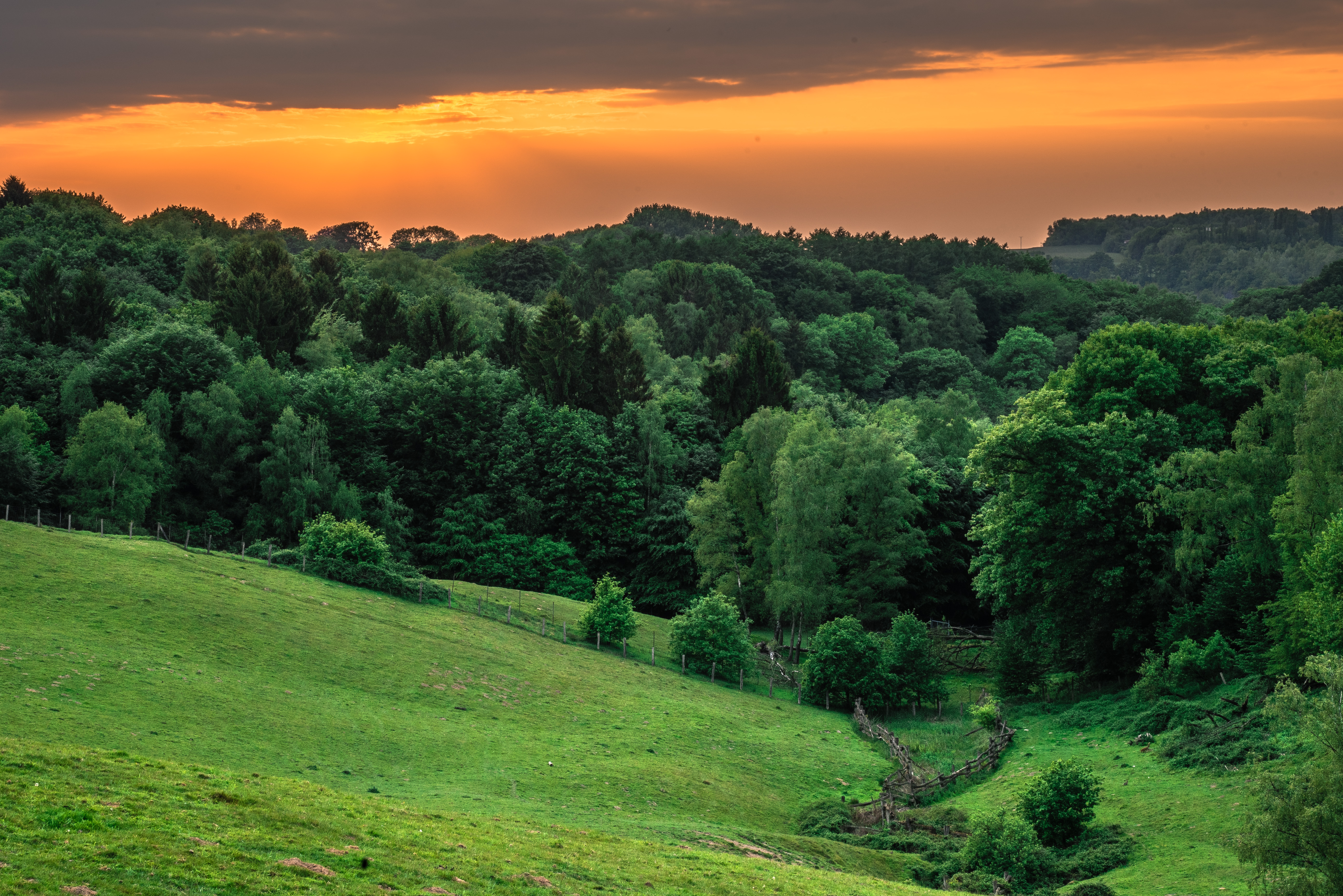 Blick nach Nordwesten ins Hofheider Bachtal im Stadtgebiet von Erkrath (Gemarkung Hochdahl) bei Sonnenuntergang; Blick aufs Tarpangehege (Grünland) im Wildpark Neandertal innerhalb des Naturschutzgebiets „Neandertal“